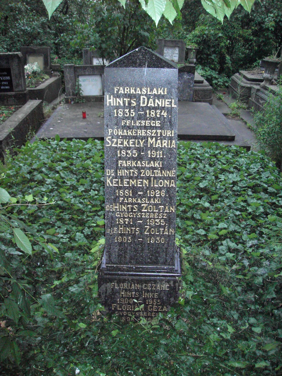 Hints Dániel és Hints Zoltán sírja, Marosvásárhely, református temető